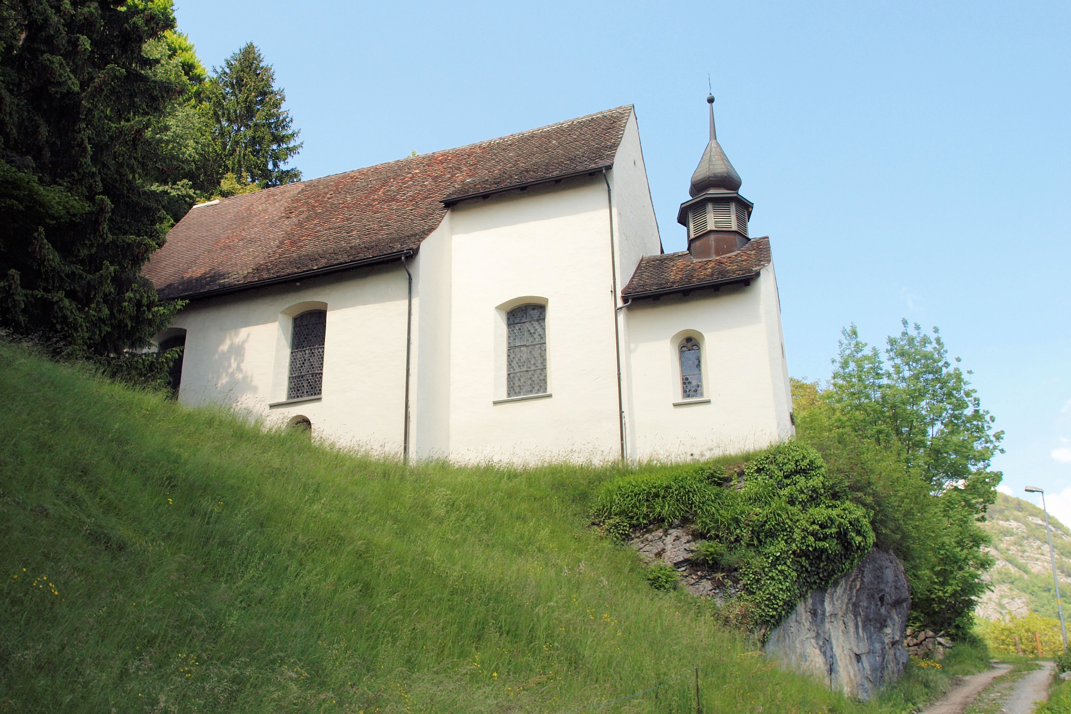 Die marienkapelle im Weiler Vild der Gemeinde Sargans